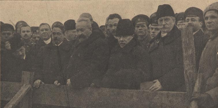 Ministros en el entierro de las víctimas de la Revolución de Febrero. Entre ellos, de izquierda a derecha: Konovalov, Shingarev, Lvov, Nekrasov, Godnev y Miliukov.